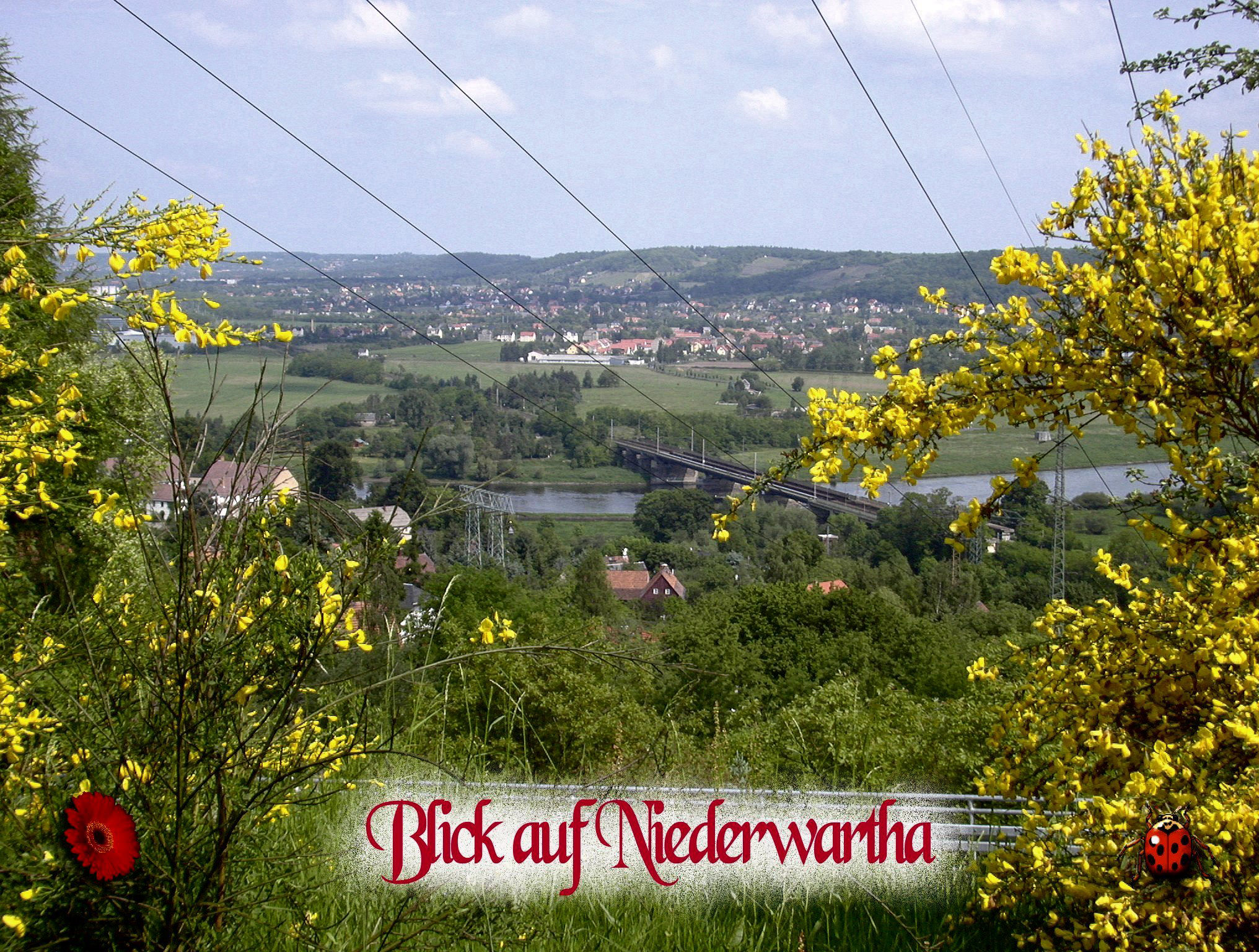 Niederwartha, Blick von der Oberwarthaer Strasse, Serpentine auf die Elbbrücke sowie im Hintergrund auf Radebeul - Naundorf